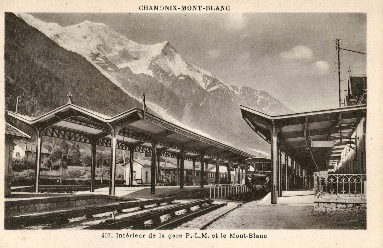 Carte postale ancienne, sans mention d'éditeur, n°407 CHAMONIX - MONT-BLANC - Intérieur de la Gare